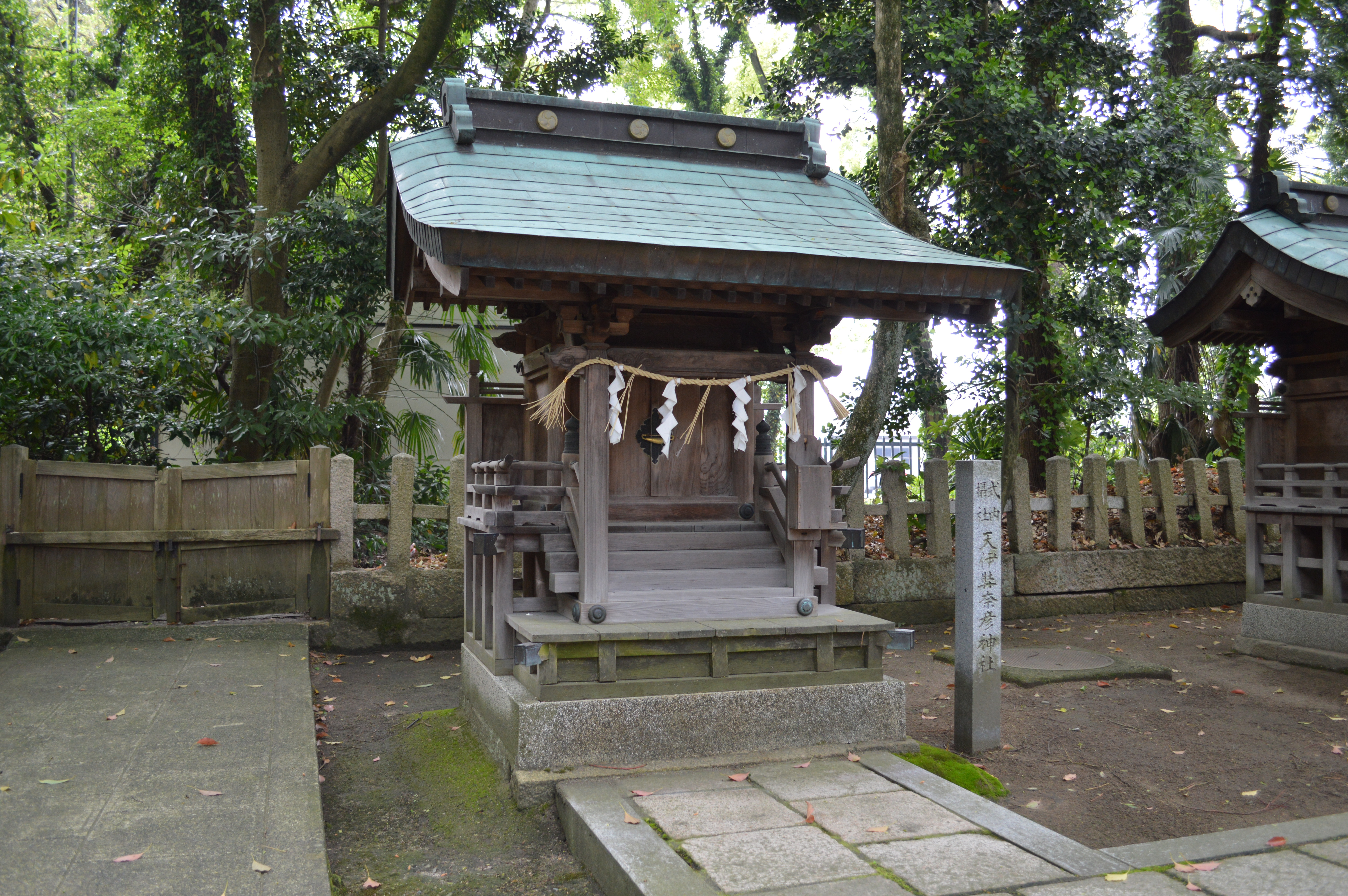 天伊弉奈彦神社 (氣比神宮境内摂社)